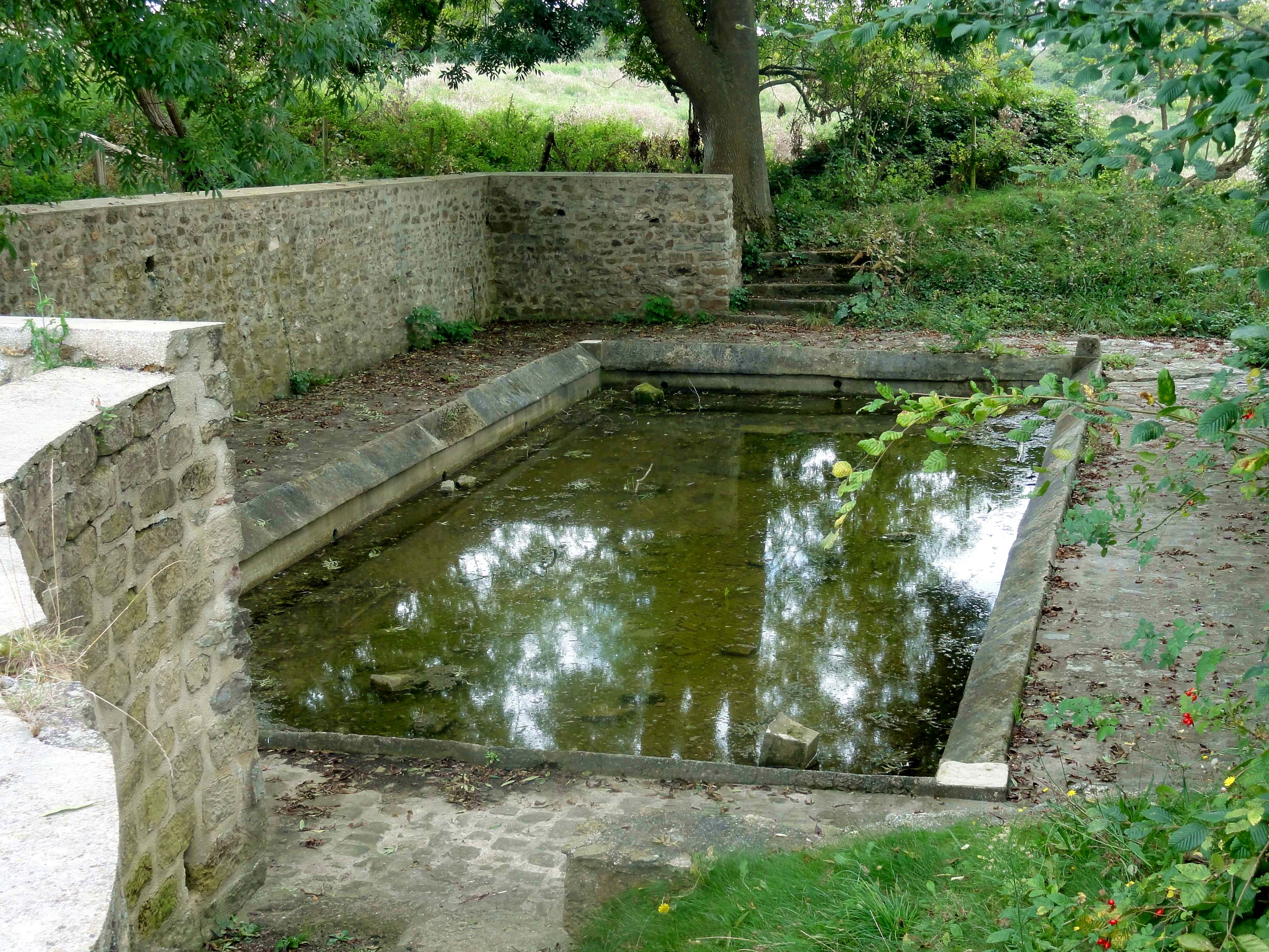 Lavoir, rue de Cléry, à l'extérieur du village.